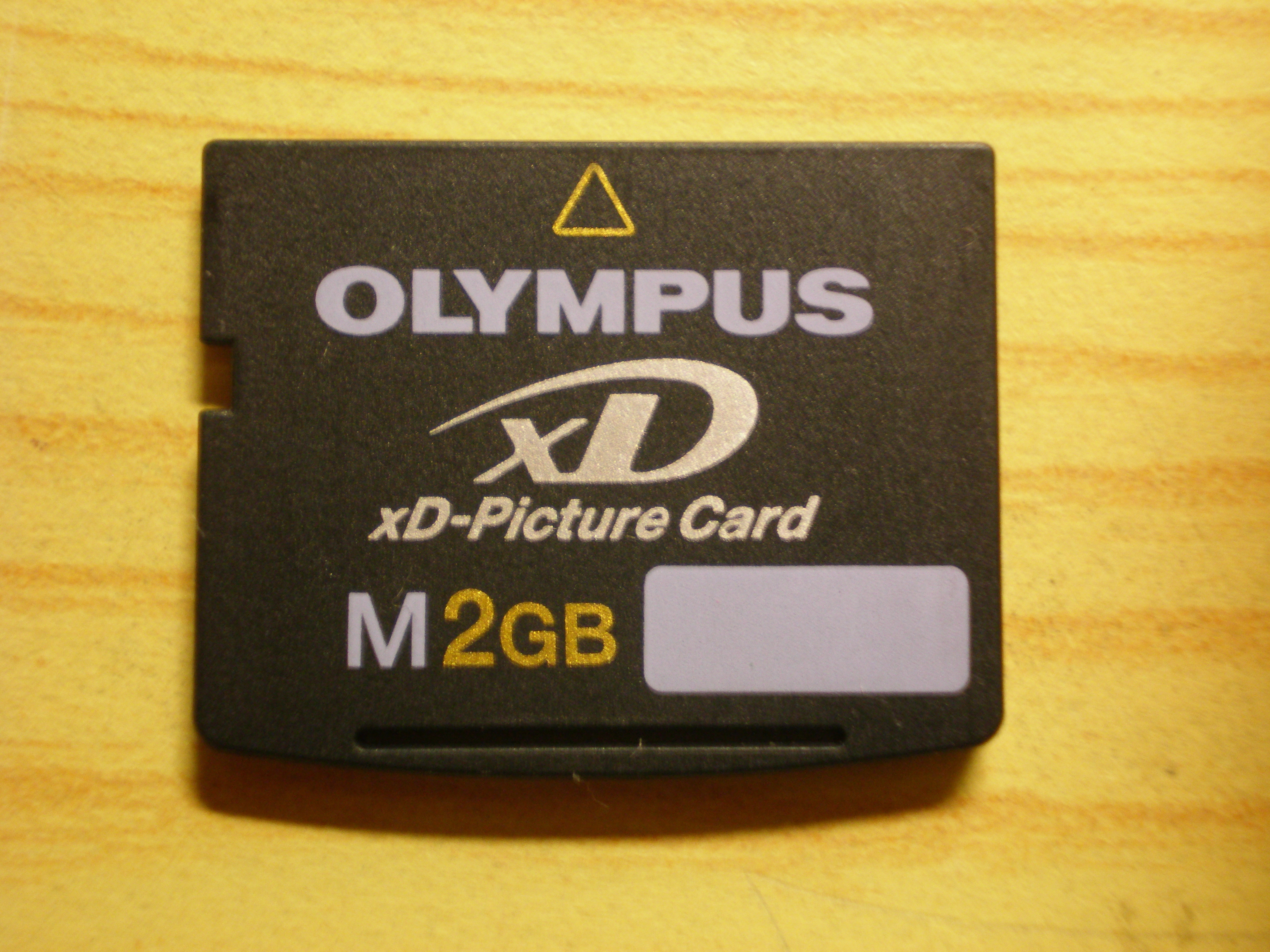 Paměťová značková karta Olympus